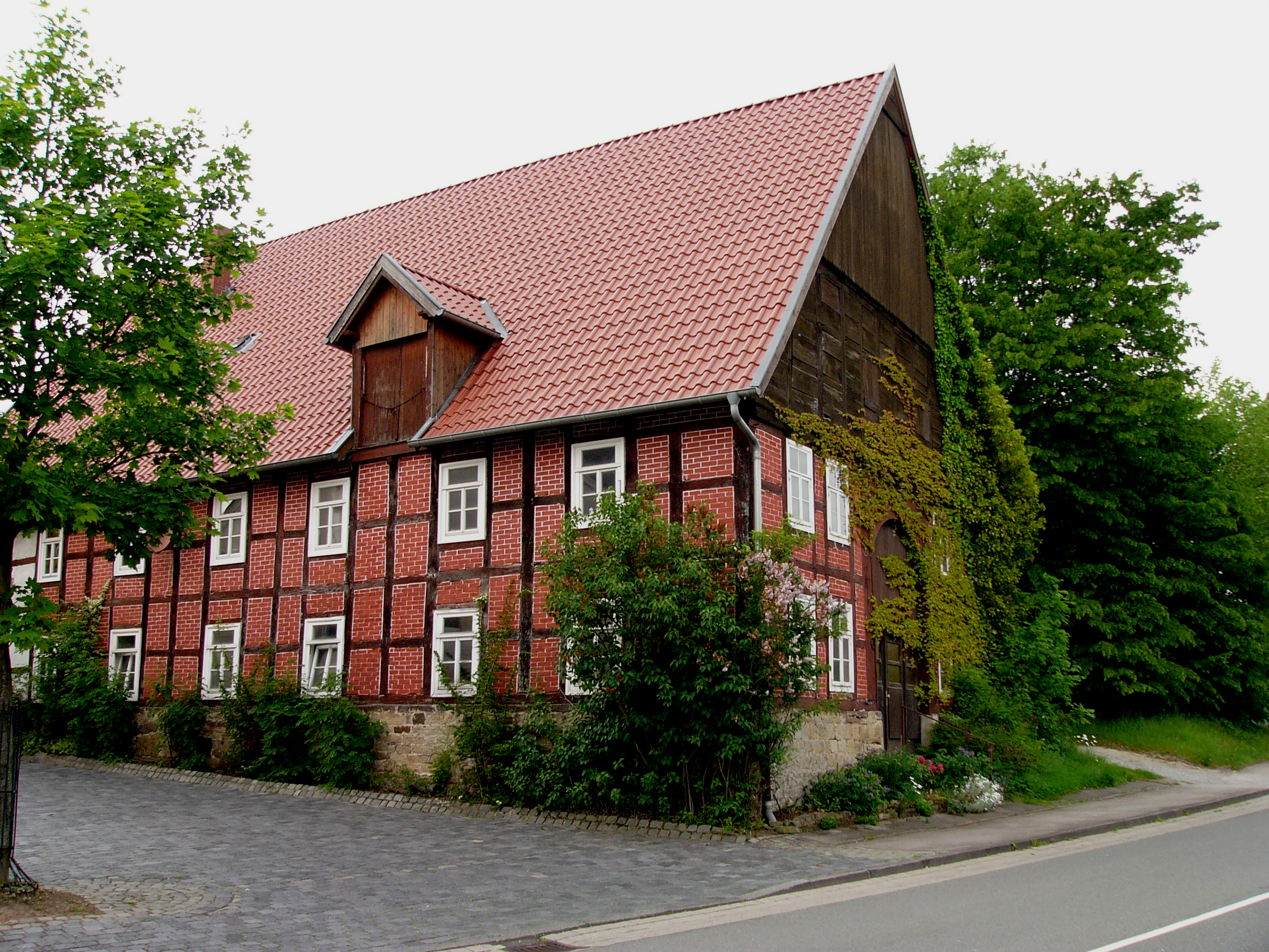 Fachwerkhaus in Großenmarpe, Ortsteil von Blomberg, Germany